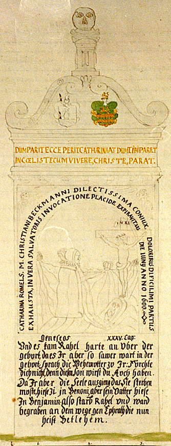 Zeichnung des hannoverschen Stadtschreibers und Chronisten Johann Heinrich Redecker der auf dem (heutigen) Alter St.-Nikolai-Friedhof in Hannover errichteten ehemaligen Grabstele der am 21. Juni 1600 verstorbenen Catharina Romels (auch: Katharina Rommel), Ehefrau des Magisters und Rektor der hannoverschen Lateinschule, Christian Beckmann ...